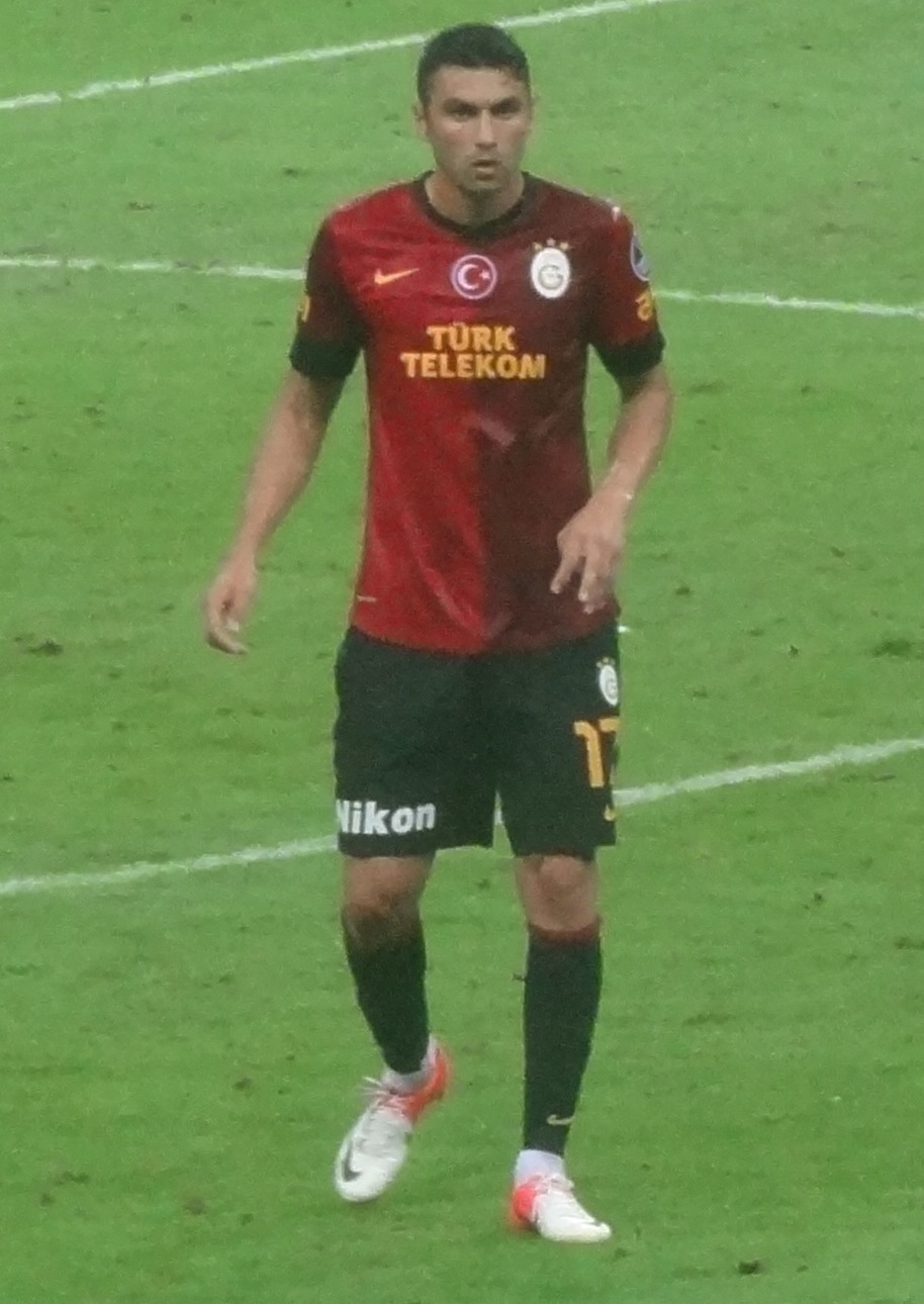 Burak ilk golüünü attığı Bursaspor karşılaşmasında.